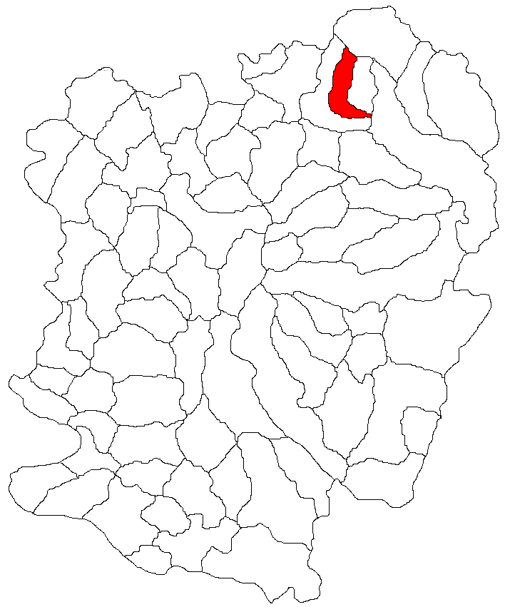 Categorie:Hărţi ale judeţului Caraş-Severin